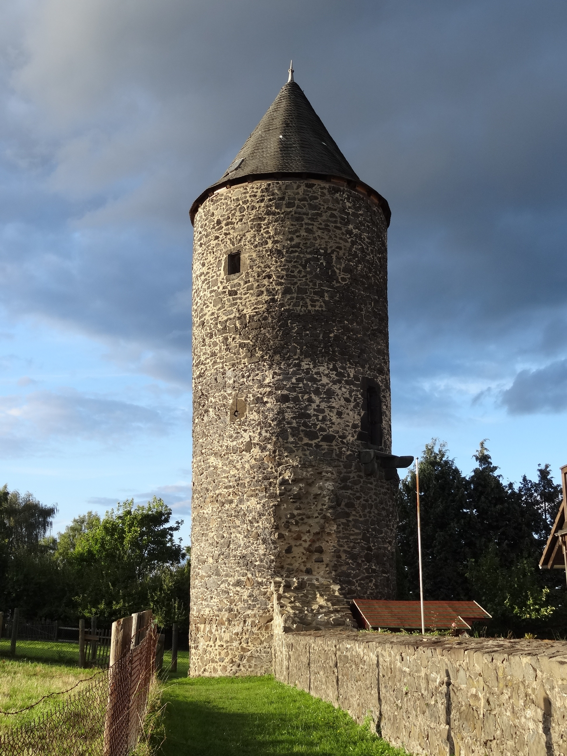 Diebsturm und Reste der Stadtmauer (Grüningen)